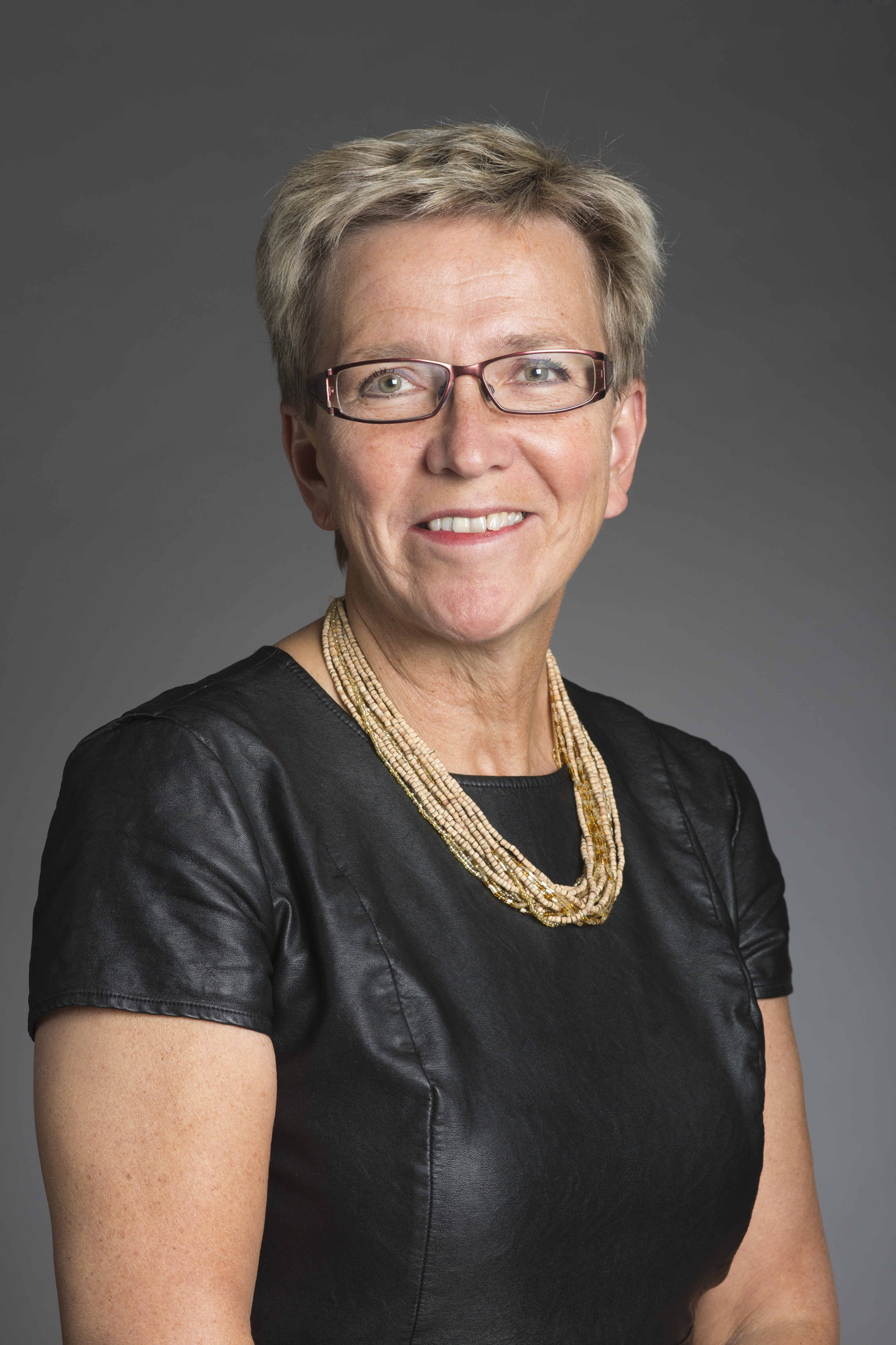 Kerstin Lundgren, Riksdagsledamot för Centerpartiet.